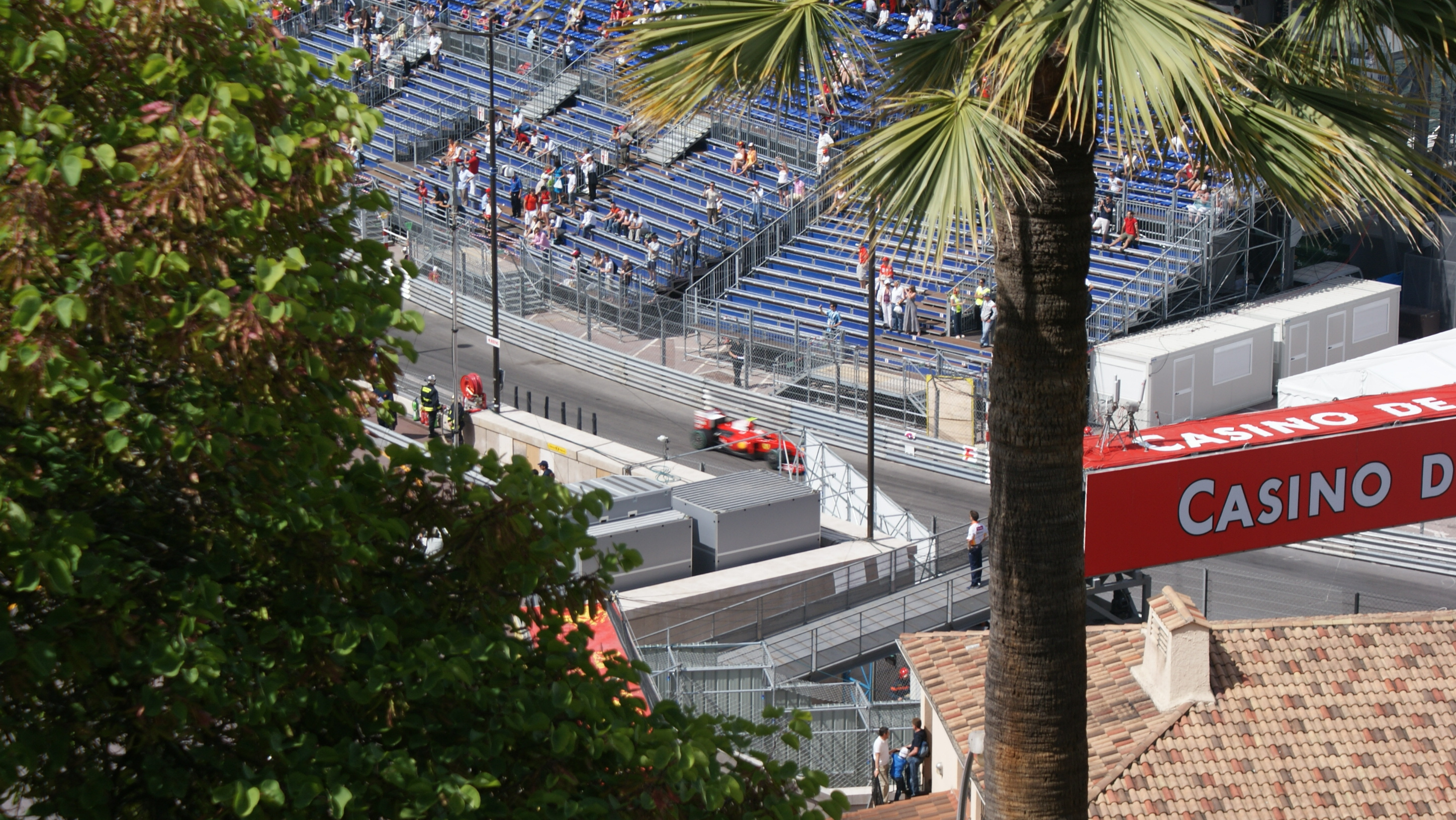 Ferrari à la Rascasse au GP de Monaco 2009